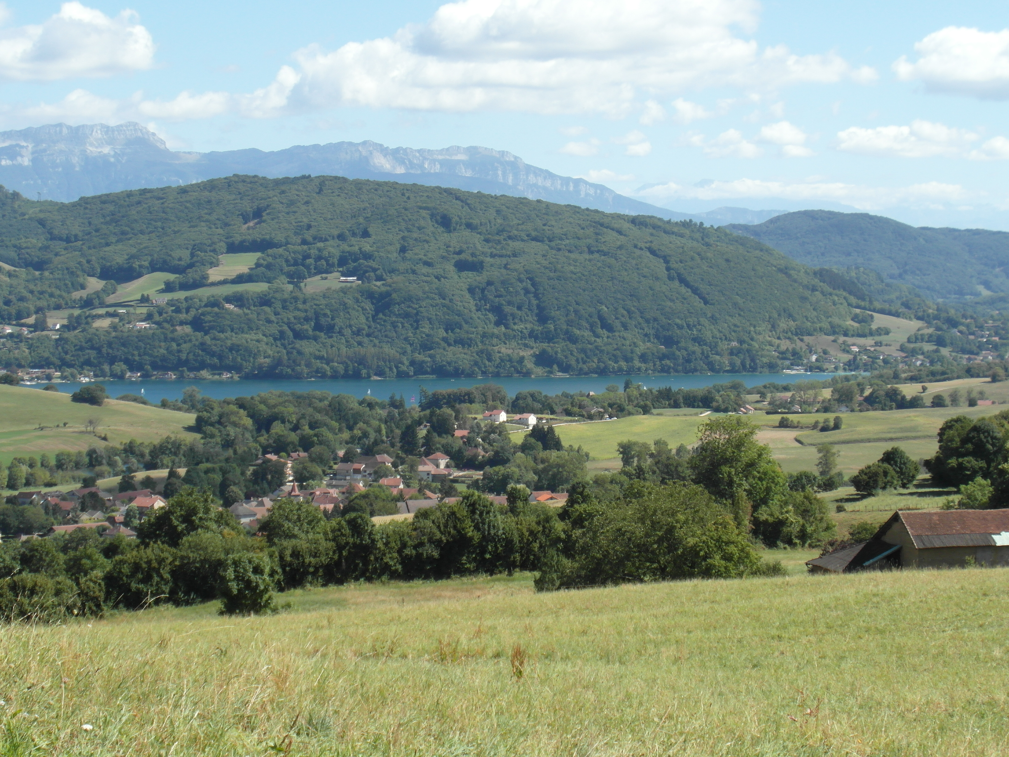 Le lac de Paladru depuis les collines de la sapinière (Versant ouest)